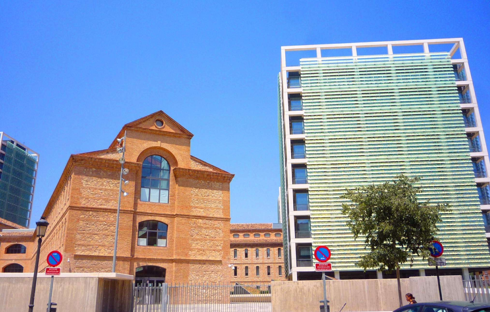 Ciutat Administrativa 9 d'Octubre (Valencia)